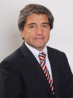 Carlos Recondo Lavanderos